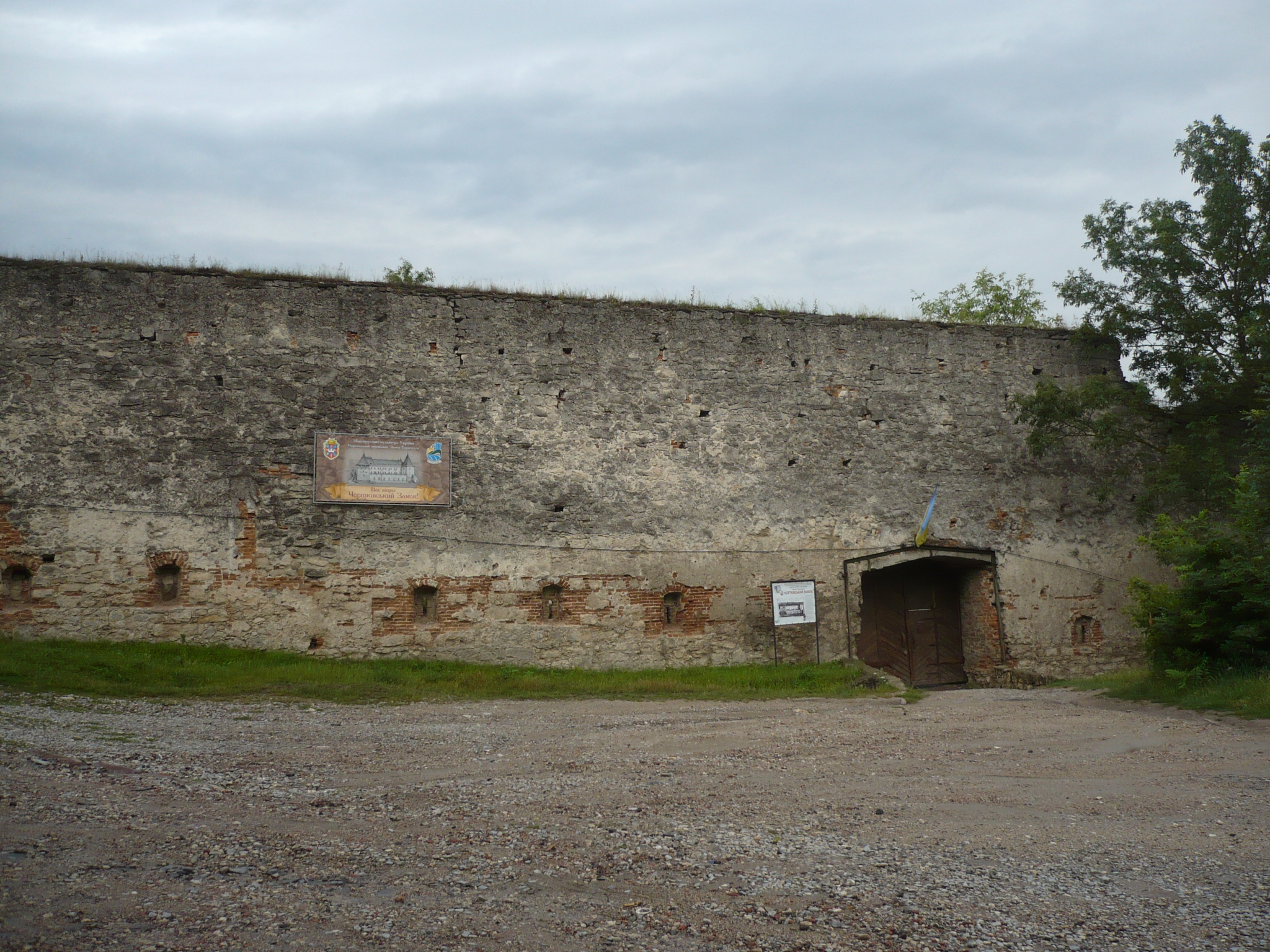 Czortków. Zamek